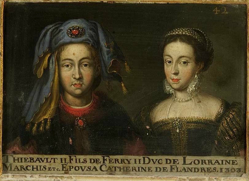 Portrait de Thiébaud II, duc de Lorraine de 1303 à 1312, et de son épouse Catherine de Flandre. Ce tableau fait partie d'une suite d'une soixantaine de double-portraits représentant les ducs et duchesses de Lorraine ainsi que leurs ancêtres supposés. La légende est erronée car l'épouse de Thiébaud était Isabelle de Rumigny. Musée des Offices, Florence